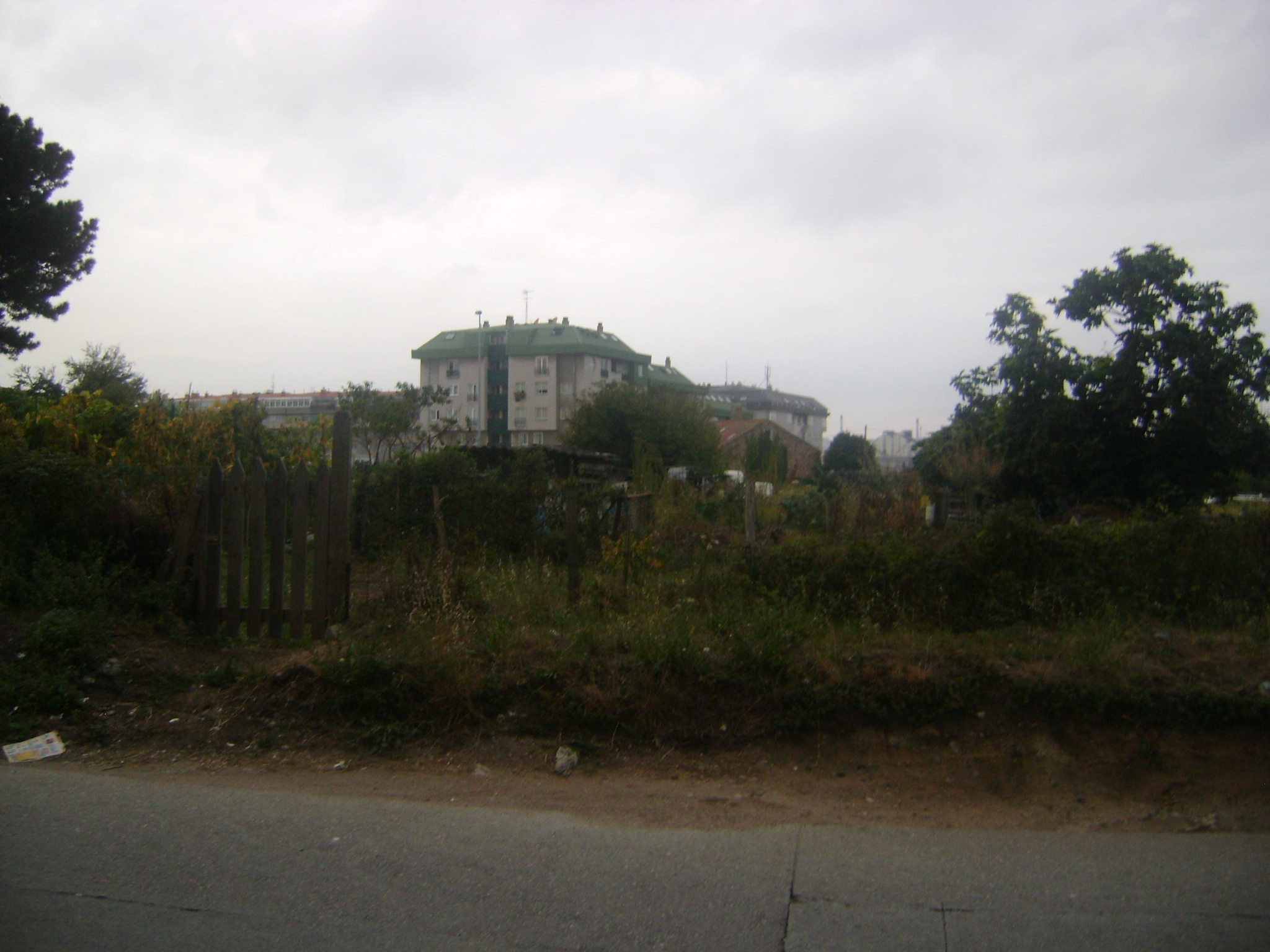 Barrio Castrillón